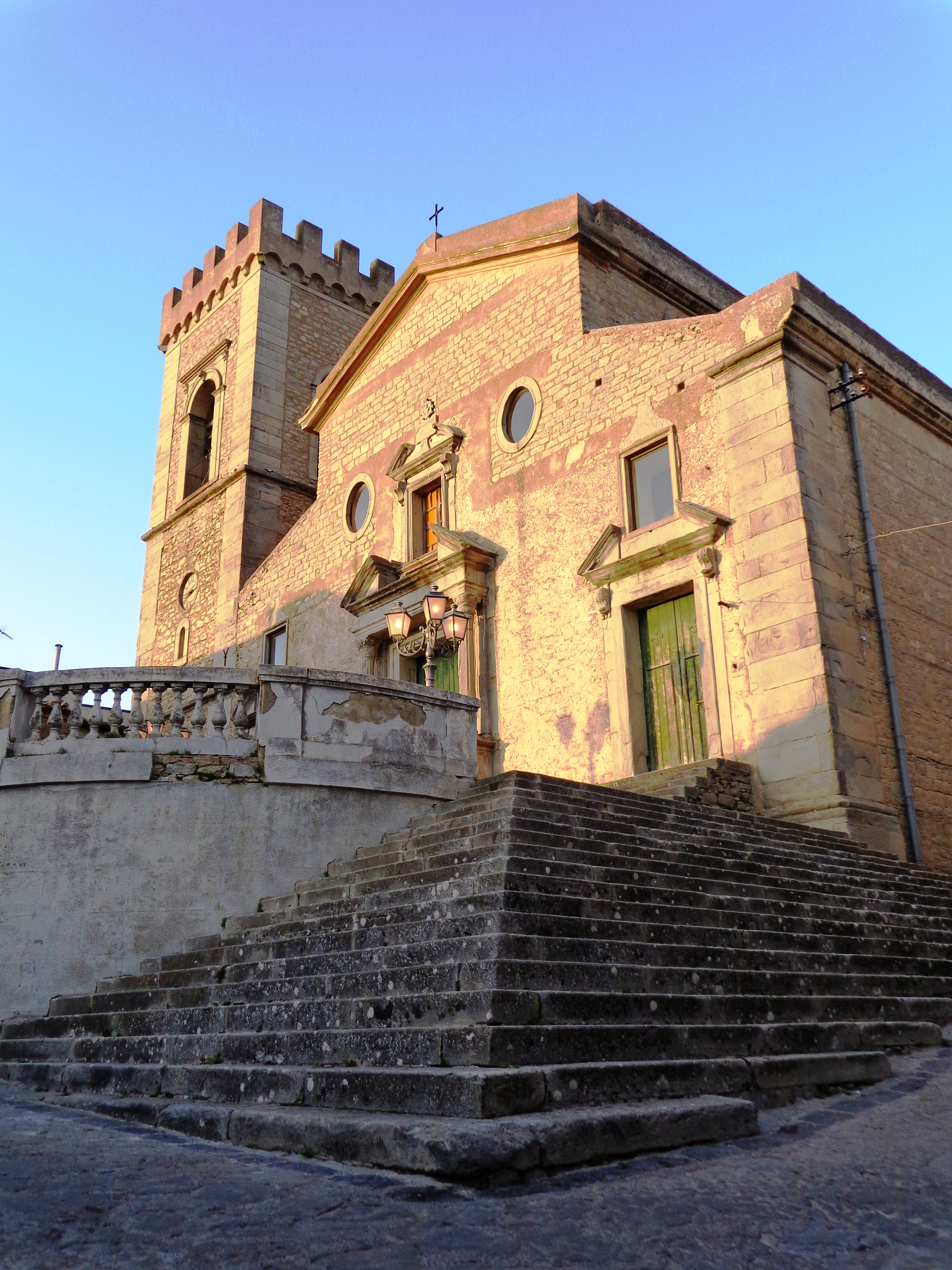 Basilica ME Veduta Piazza